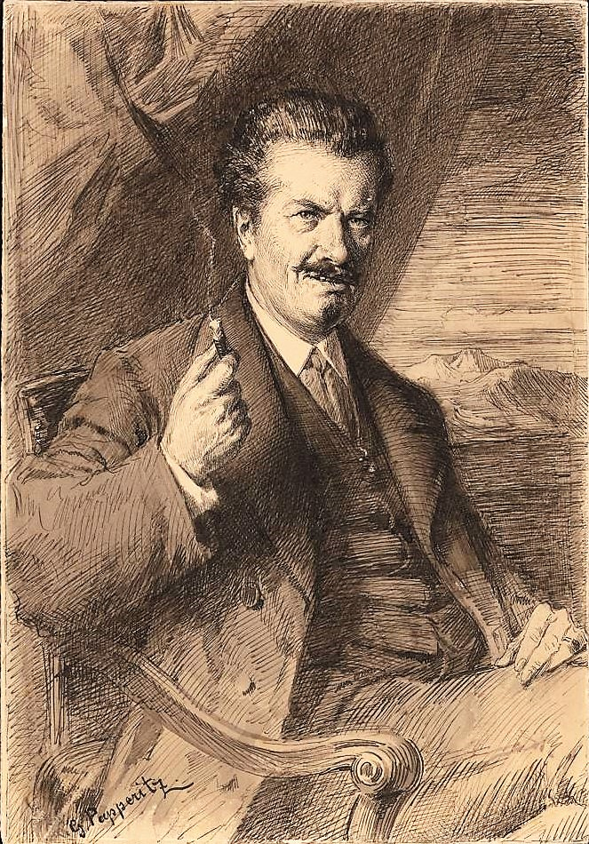 Friedrich Georg Papperitz: Porträt des Zürcher Dichters Heinrich Leuthold, München?, um 1900? Zeichnung : Feder in Grau und Schwarz, in Grautönen laviert ; 23 x 16,2 cm. Zentralbibliothek Zürich, Leuthold, Heinrich I,7.